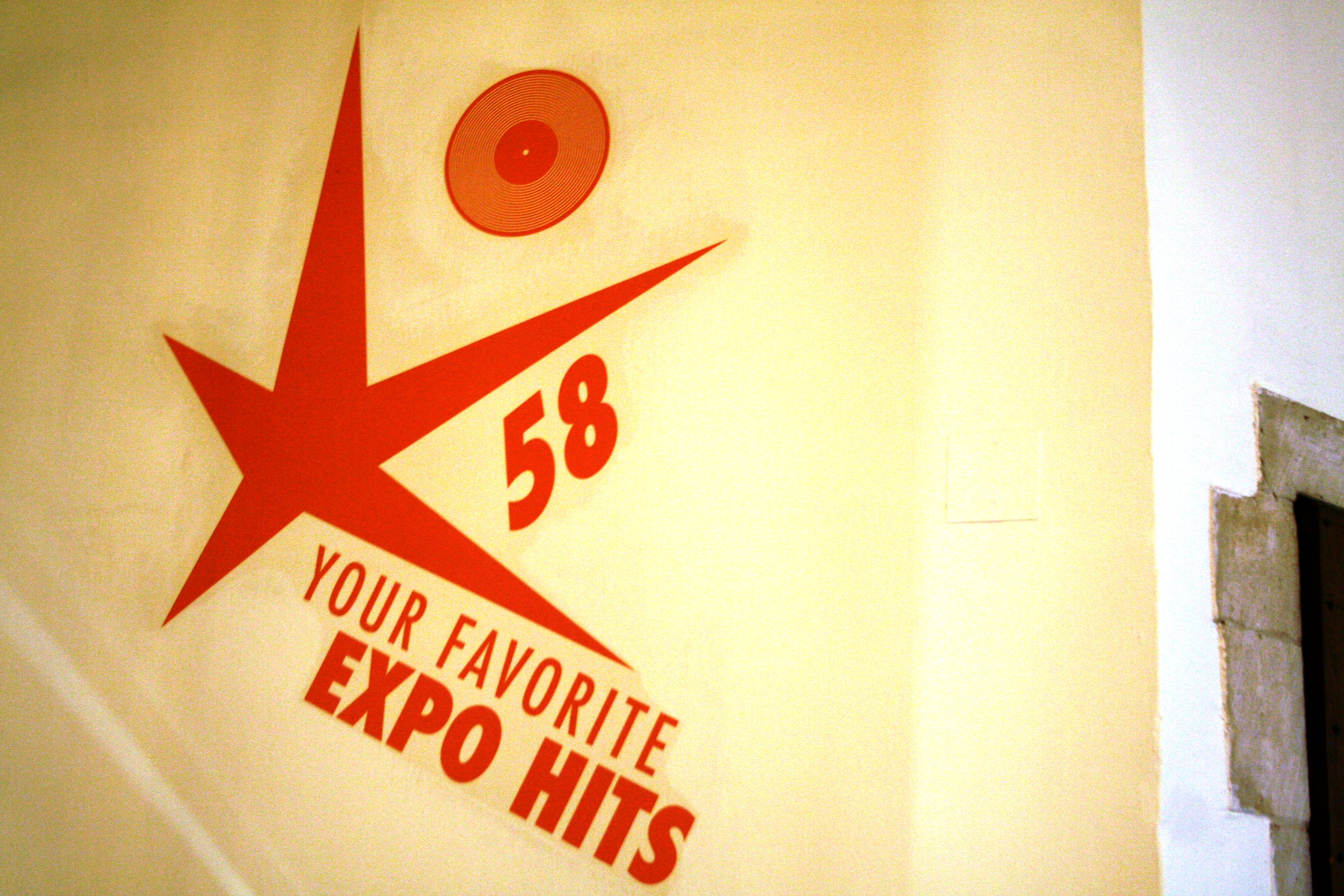 Expo 58